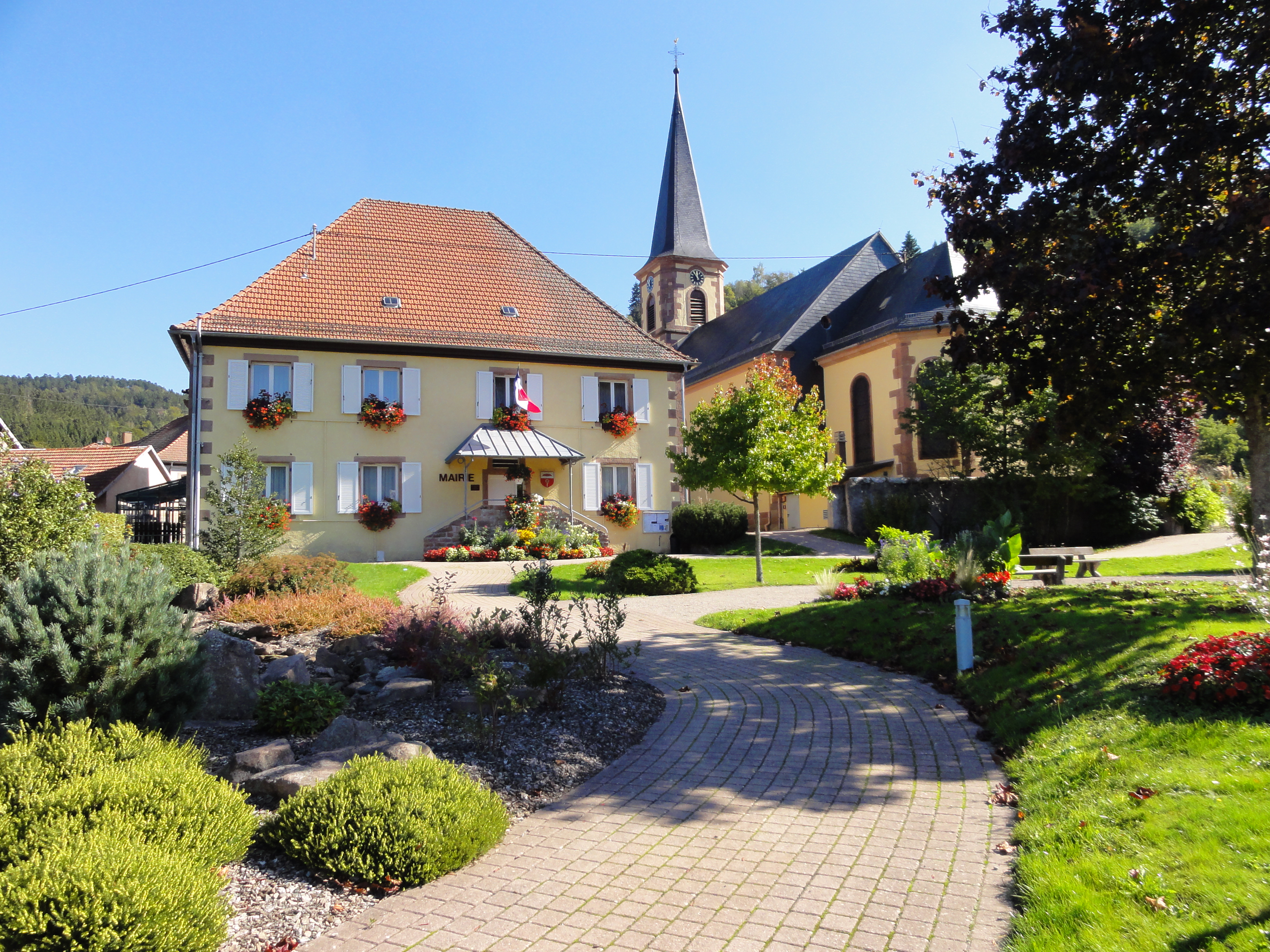 Alsace, Bas-Rhin, Colroy-la-Roche, Ancien presbytère, actuelle mairie (1789), 2 rue de l'Eglise. .